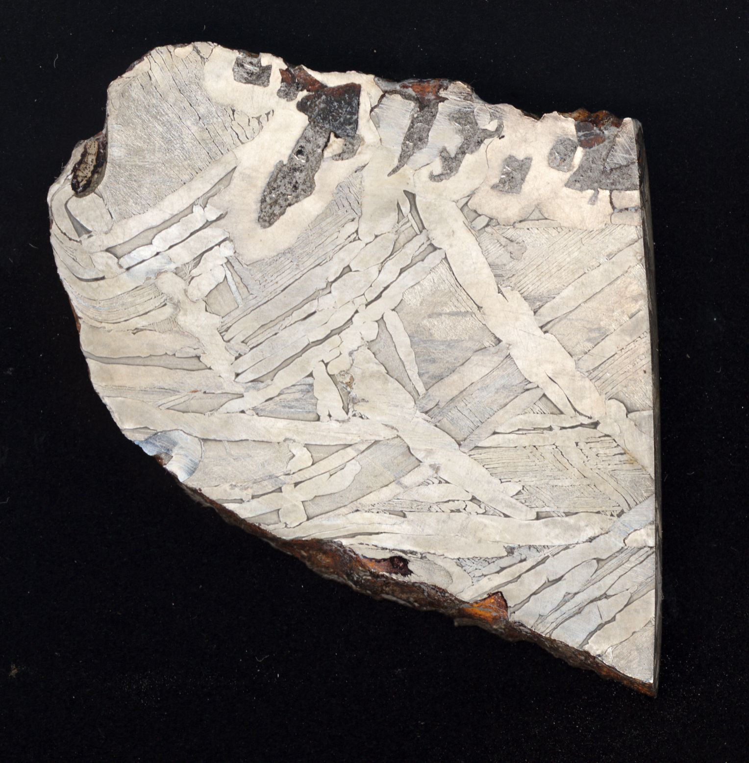 Meteorit, Eisenmeteorit; Fundort: Seymchan, Magadan, Russland; Fundjahr 1967